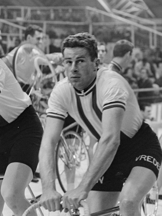 Zesdaagse in de RAI. Jaap Oudkerk